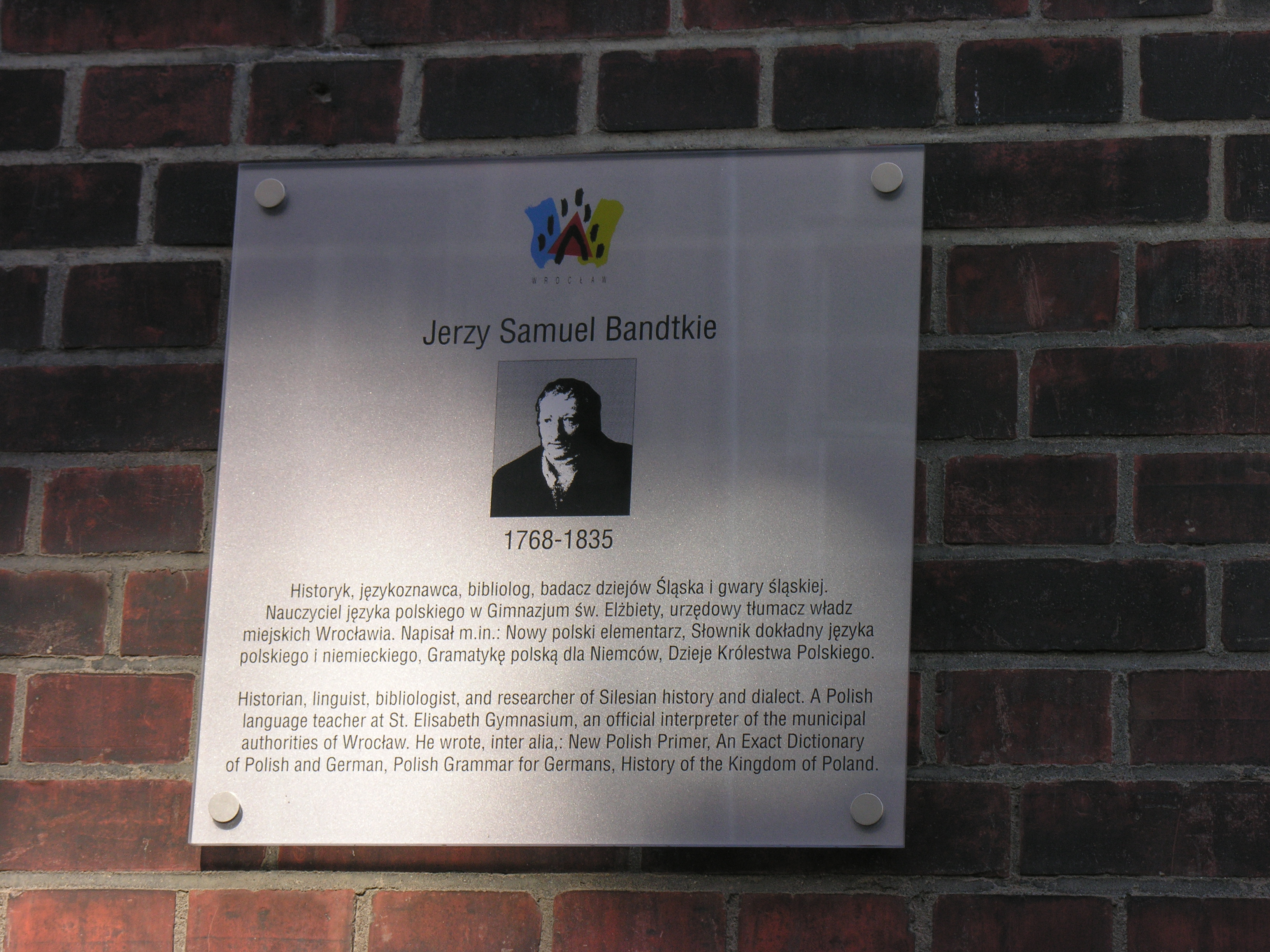 Tablica ku czci Jerzego Samuela Bandtkie na głównym budynku Biblioteki Uniwersyteckiej we Wrocławiu, ul. Szajnochy 7/9